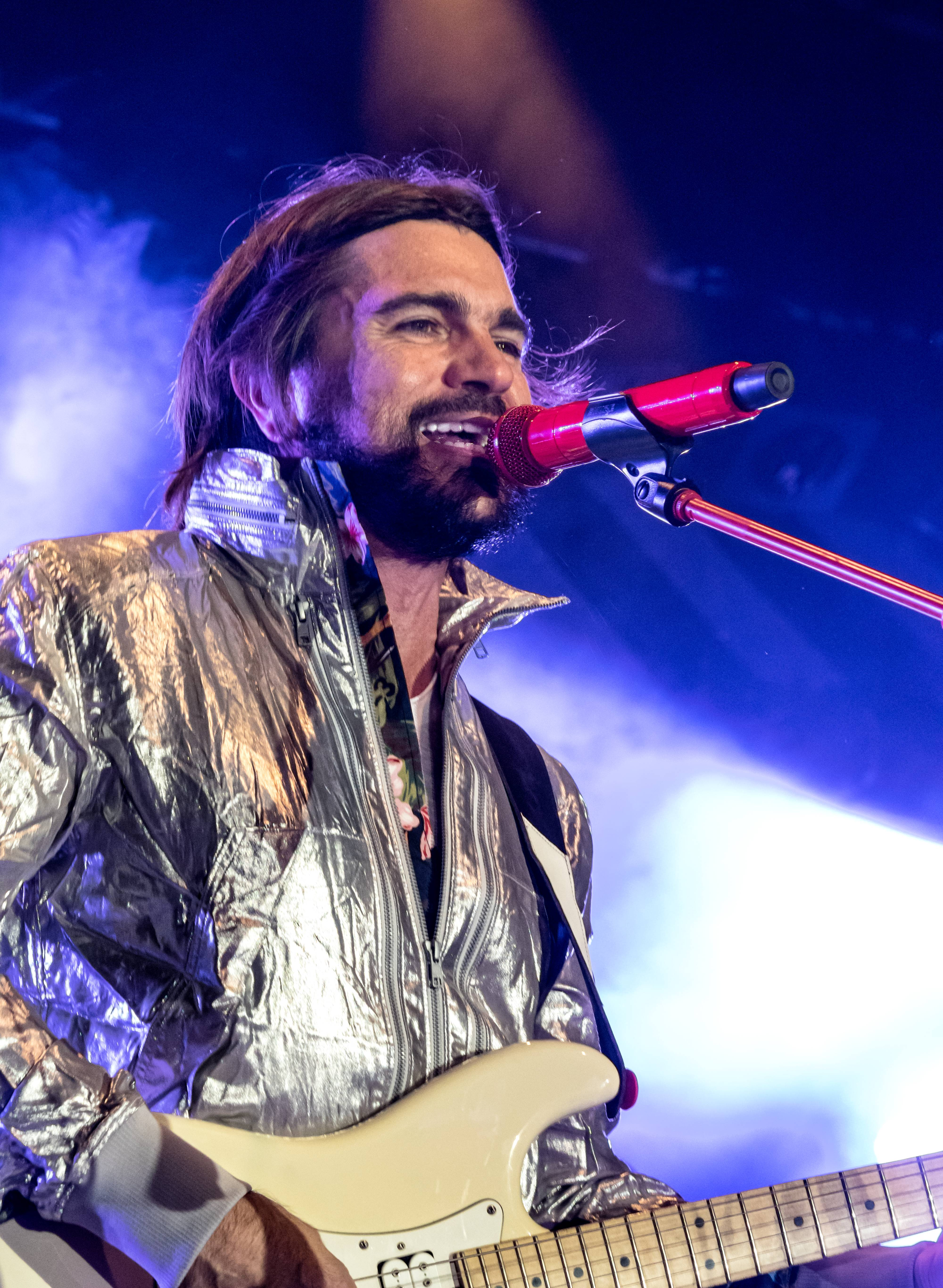 Bilder vom ZMF 2015 JUANES am 18. Juli 2015